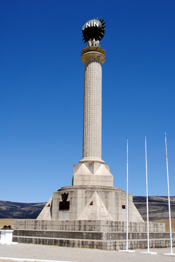 Obelisco de Chacamarca, en homenaje a los vencedores de la batalla de Junín, ubicado en la Heroíca Provincia de Junín Perú